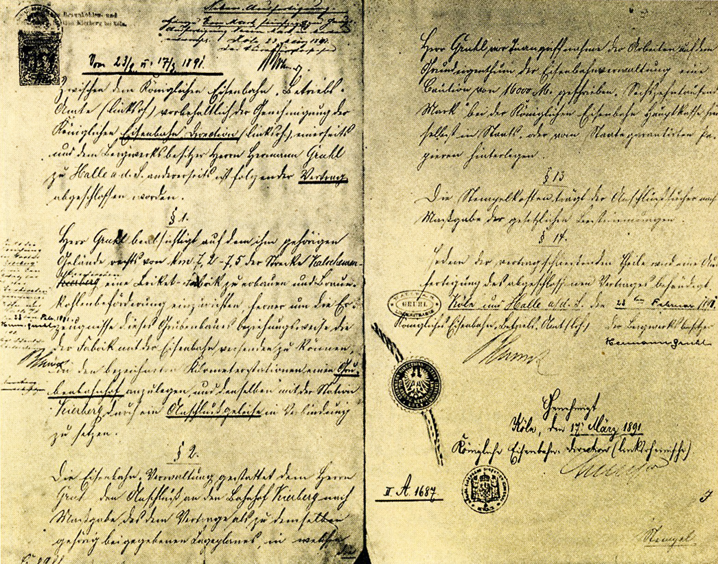 Vertrag zum Bau des Güterbahnhos Kierberg (Brühl) zwischen dem Grubenbesitzer Hermann Gruhl und der Königlichen Eisenbahn Direktion Cöln